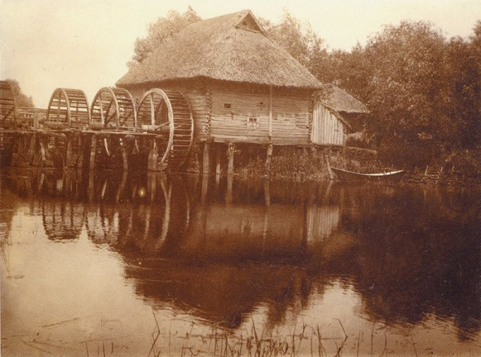 Мельница на реке Ворскла, 1910 год